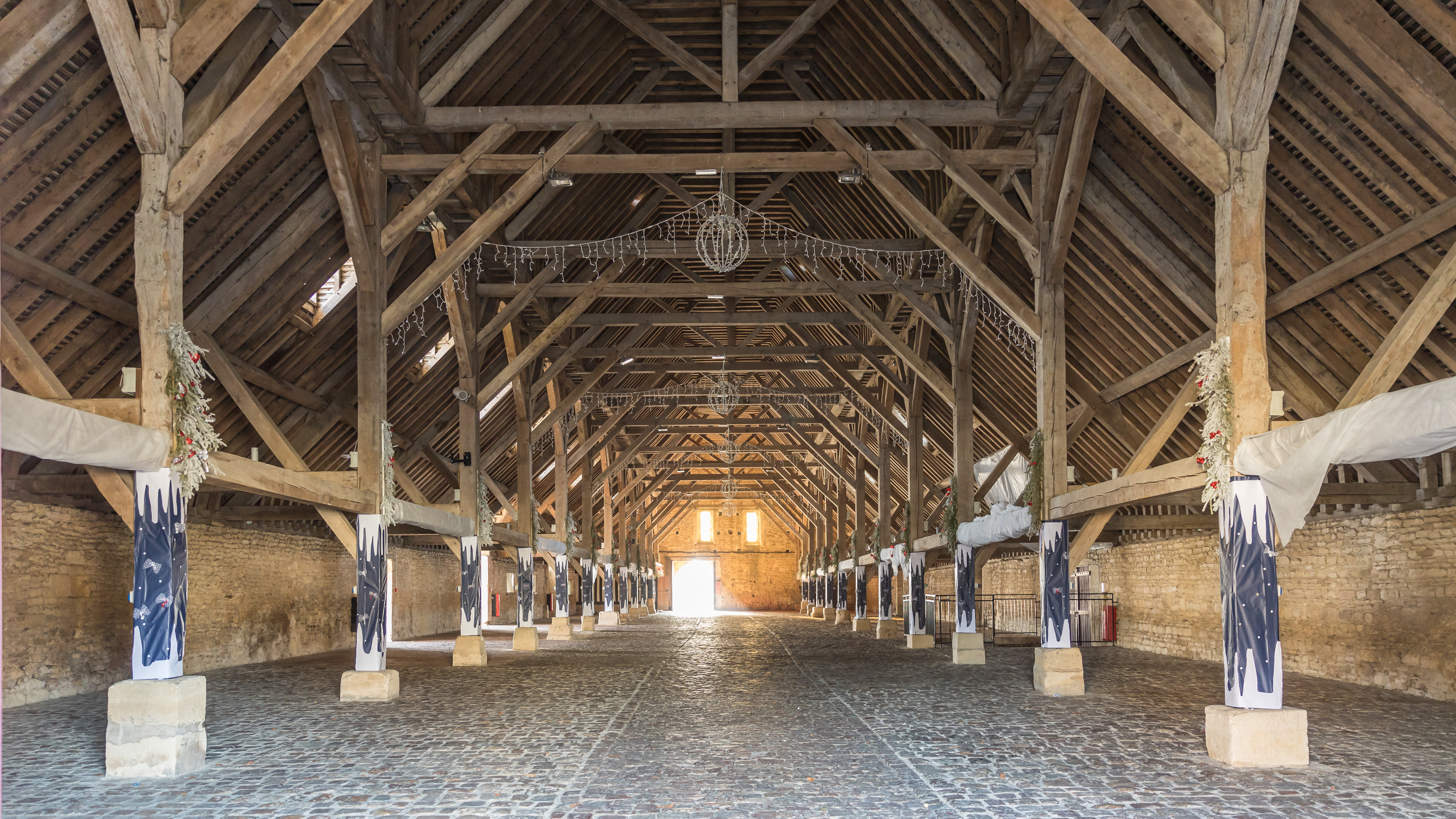 Halles de Saint-Pierre-sur-Dives